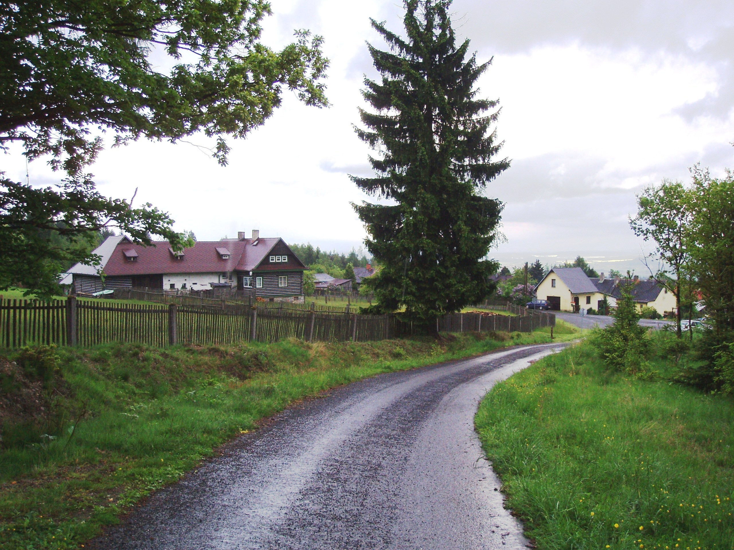 Vesnička Nepomuk pod Brdy